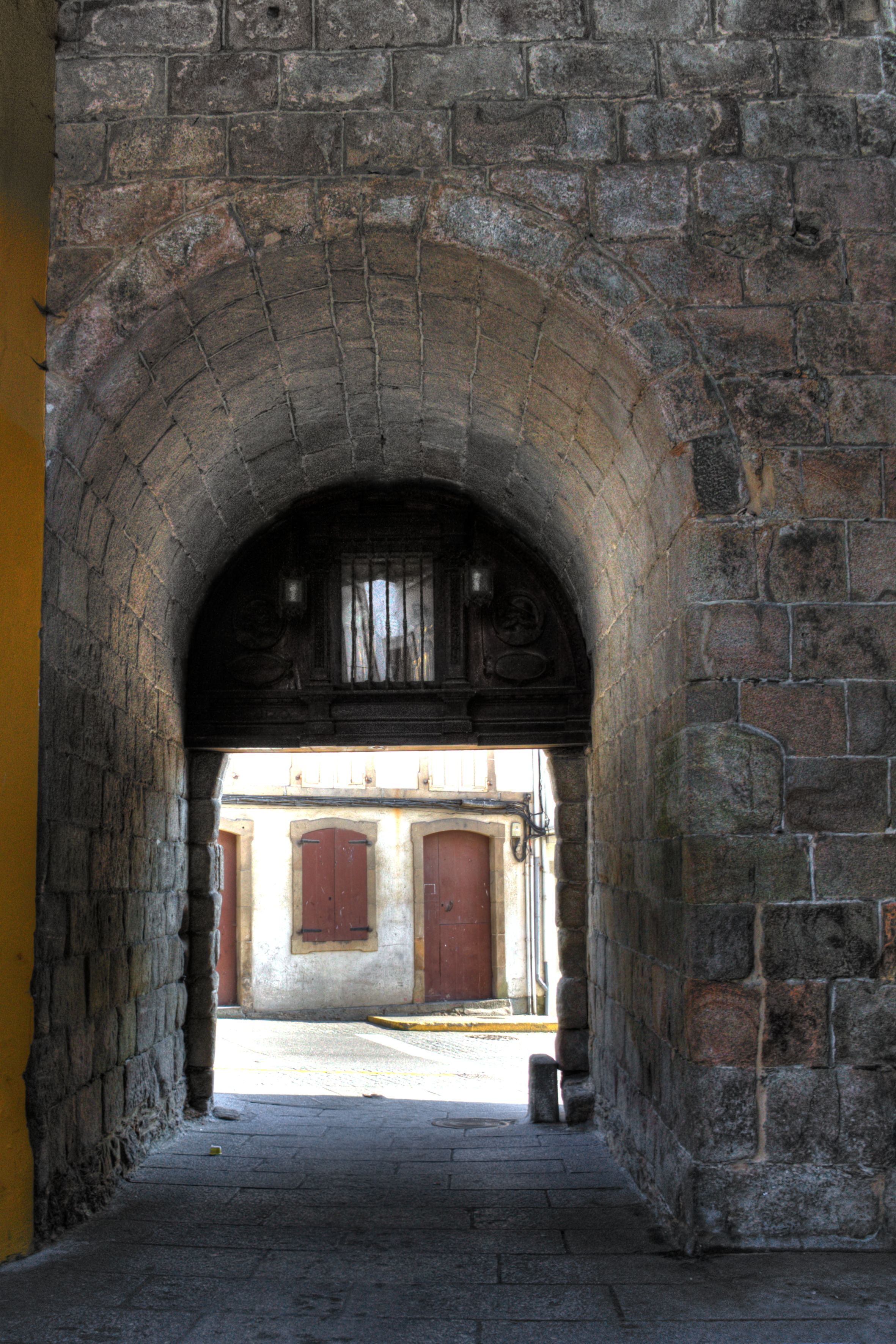 Viveiro, Puerta del Cristo - Porta da Vila